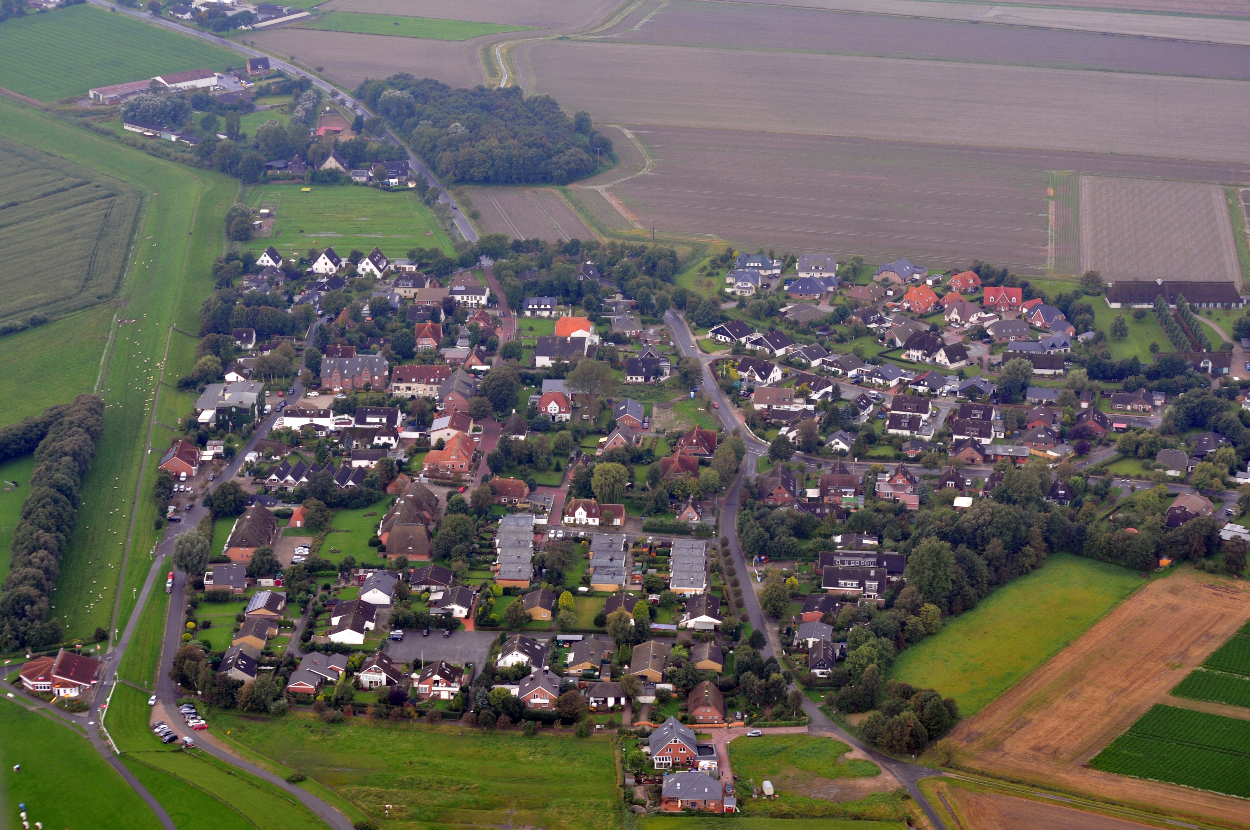 Fotoflug 4. Sept. 2011, Büsumer Deichhausen Dieses Foto entstand aufgrund eines Projektes, das von Wikimedia Deutschland e. V. gefördert wurde. Im Rahmen des „Community-Projektbudgets“ sollen Luftbilder u.a. von Inseln, Halligen, Sanden und Küstenorten der deutschen Nordseeküste angefertigt werden. Das Projekt „Fotoflüge“ wurde im September 2011 begonnen.